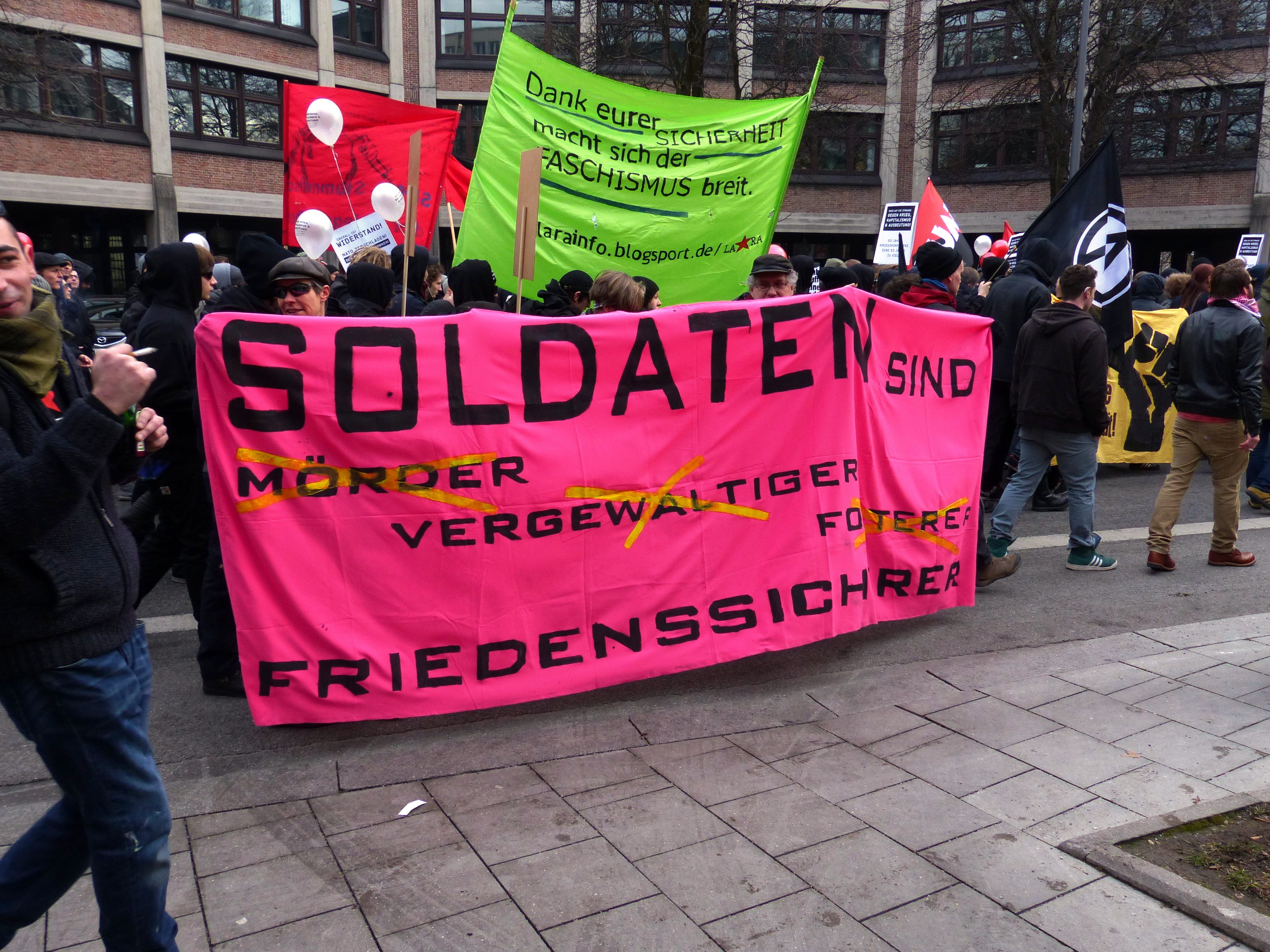 Demonstration gegen die Sichtheitskonferenz 1.2.2014 - München